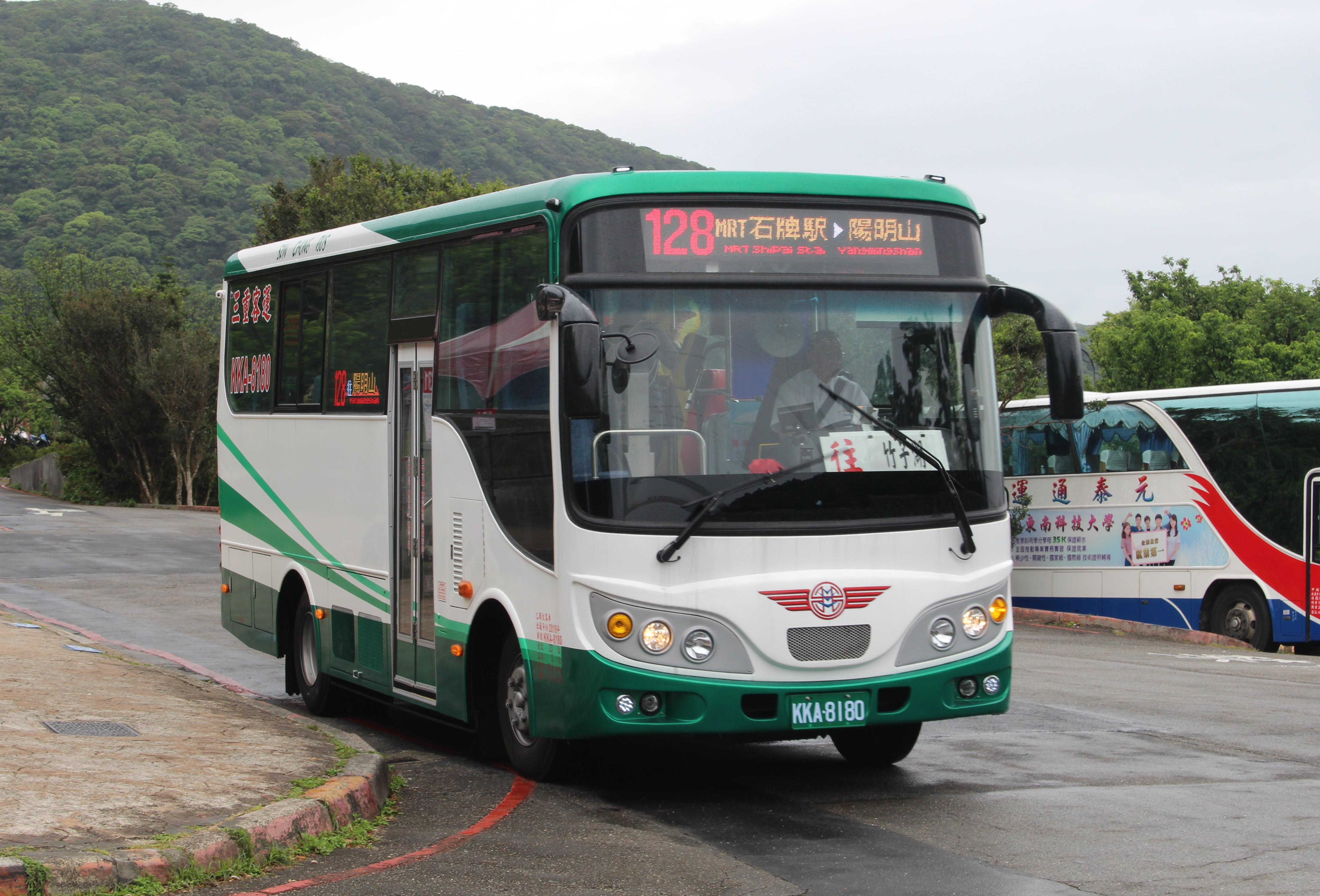 三重客運2019 HINO FC7JGTZ-AZF KKA-8180 128